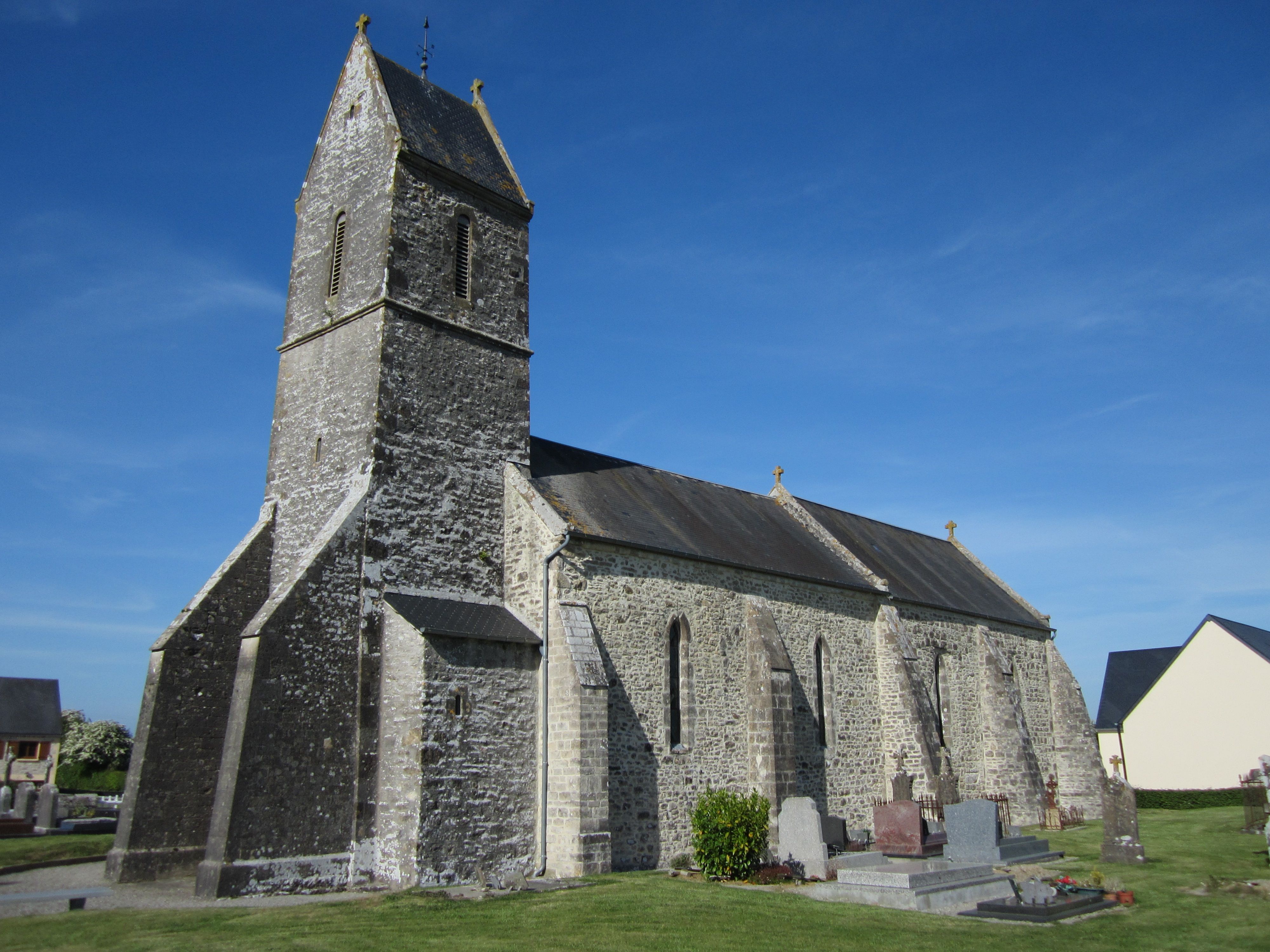 église Notre-Dame d'Hauteville-Bocage